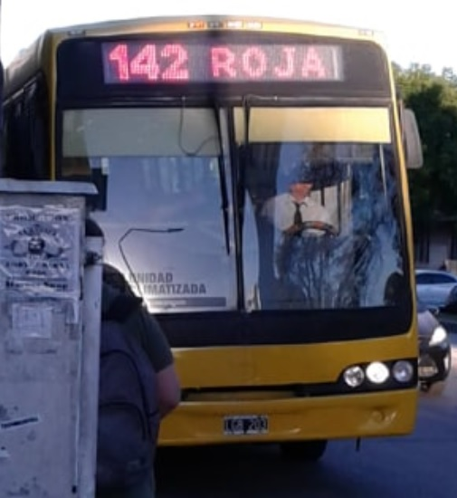 Interno de la línea 142, afectado a la variante "Roja"